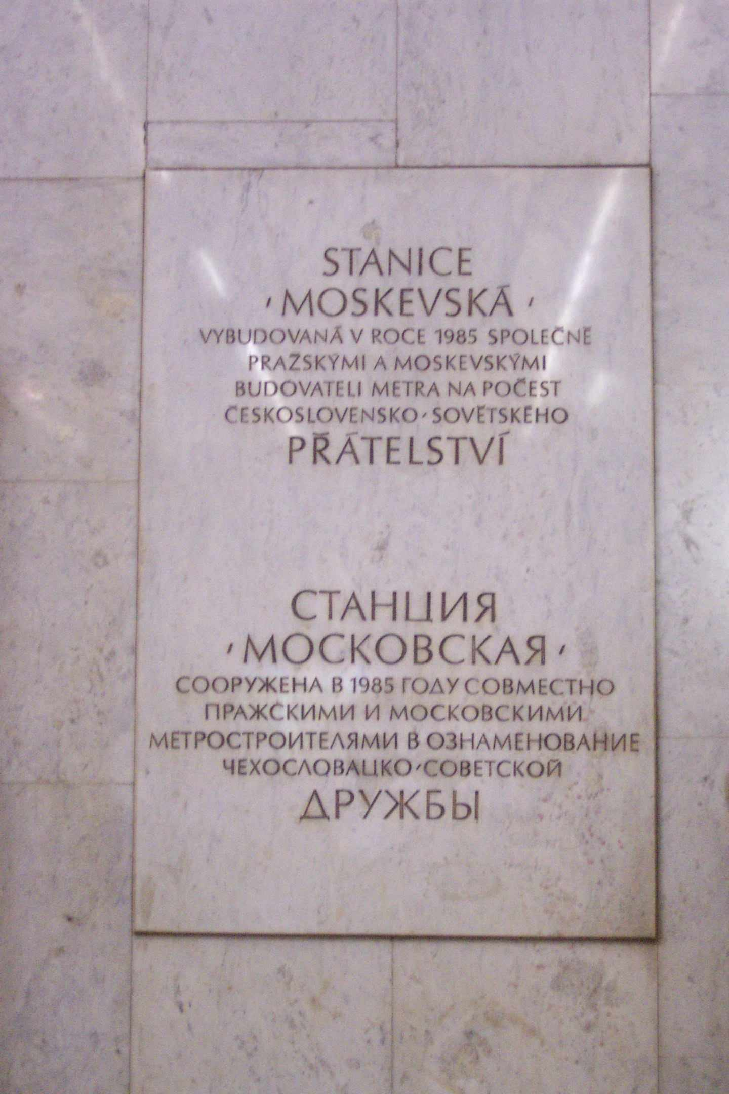 The memorial of czechoslovak-soviet cooperation in Anděl station in Prague - Památník československo-sovětské spolupráce ve stanici metra Anděl v Praze